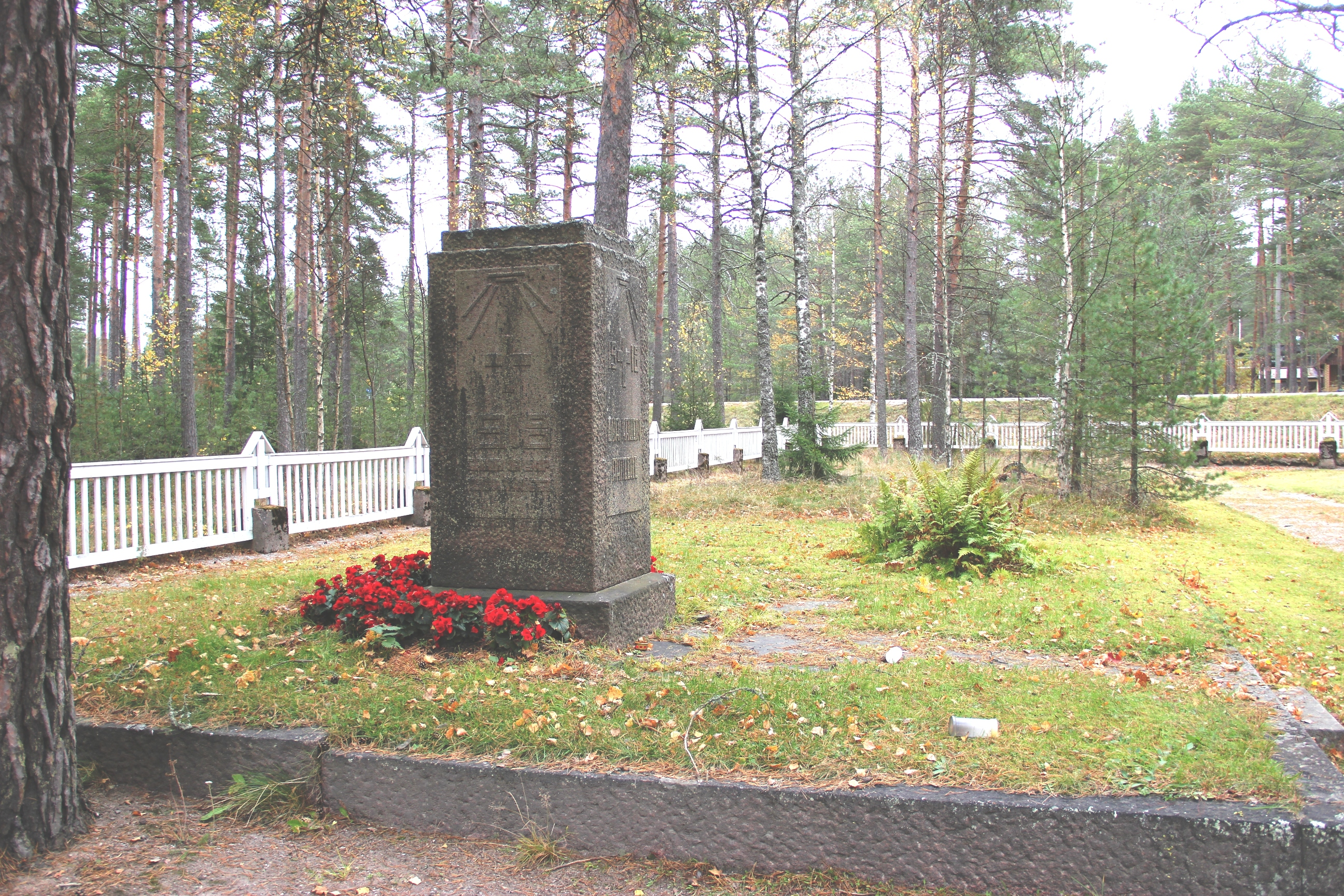 Punaisten muistomerkki, Märynummi, Halikko, Salo - Muistomerkki pystytetty 3.11.1940.